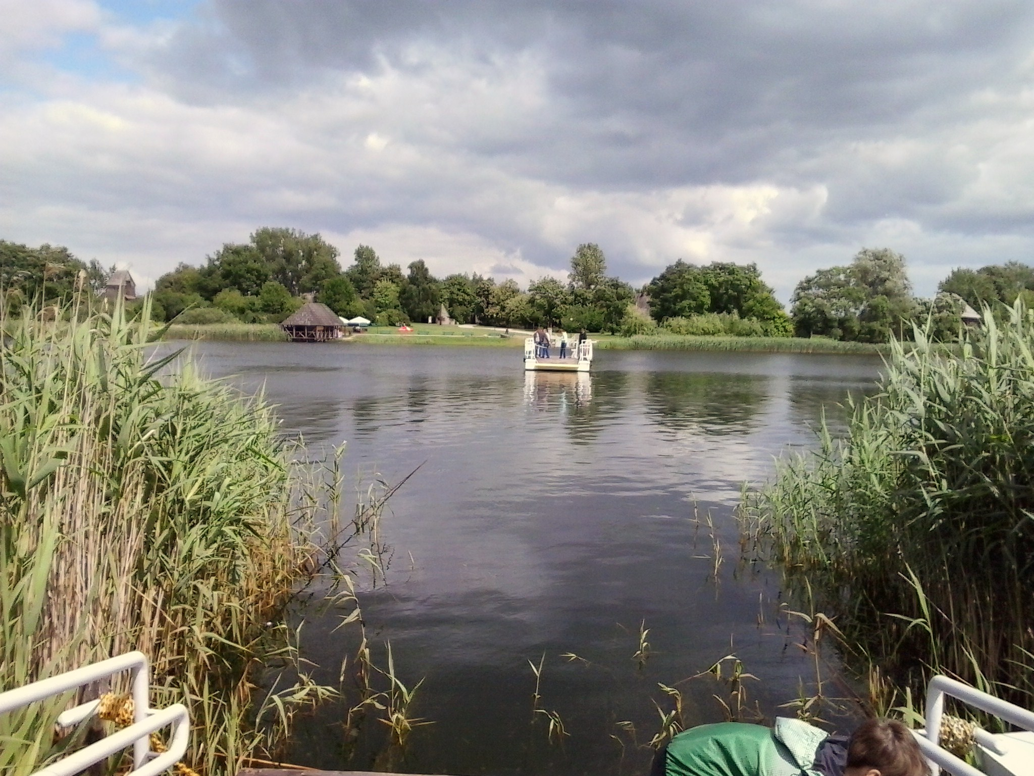 Prom na Ostrów Lednicki.